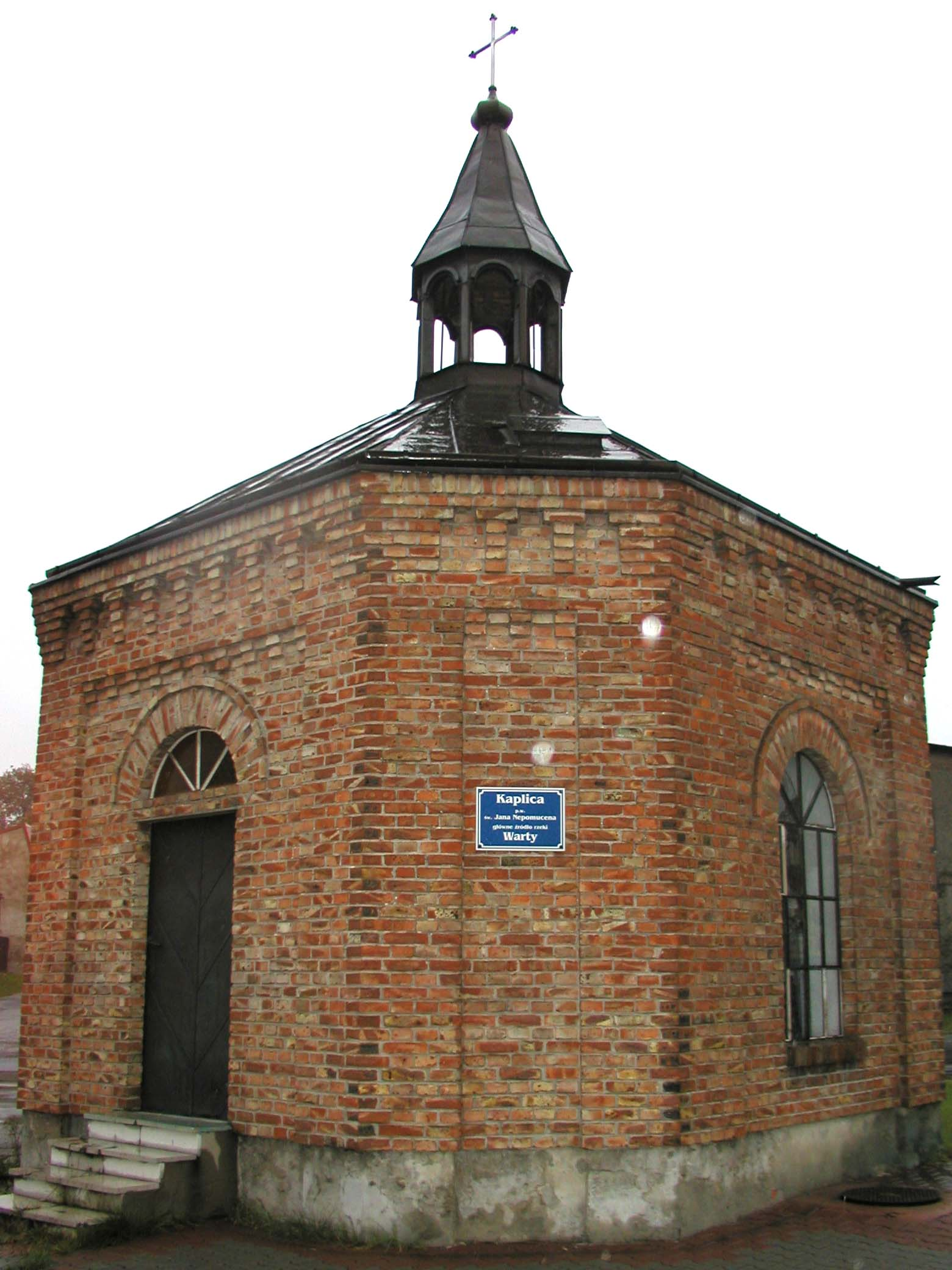 Kapliczka w Kromołowie na której tabliczka głosi: Kapliczka pod wezwaniem św. Jana Nepomucena Główne źródło rzeki Warty.